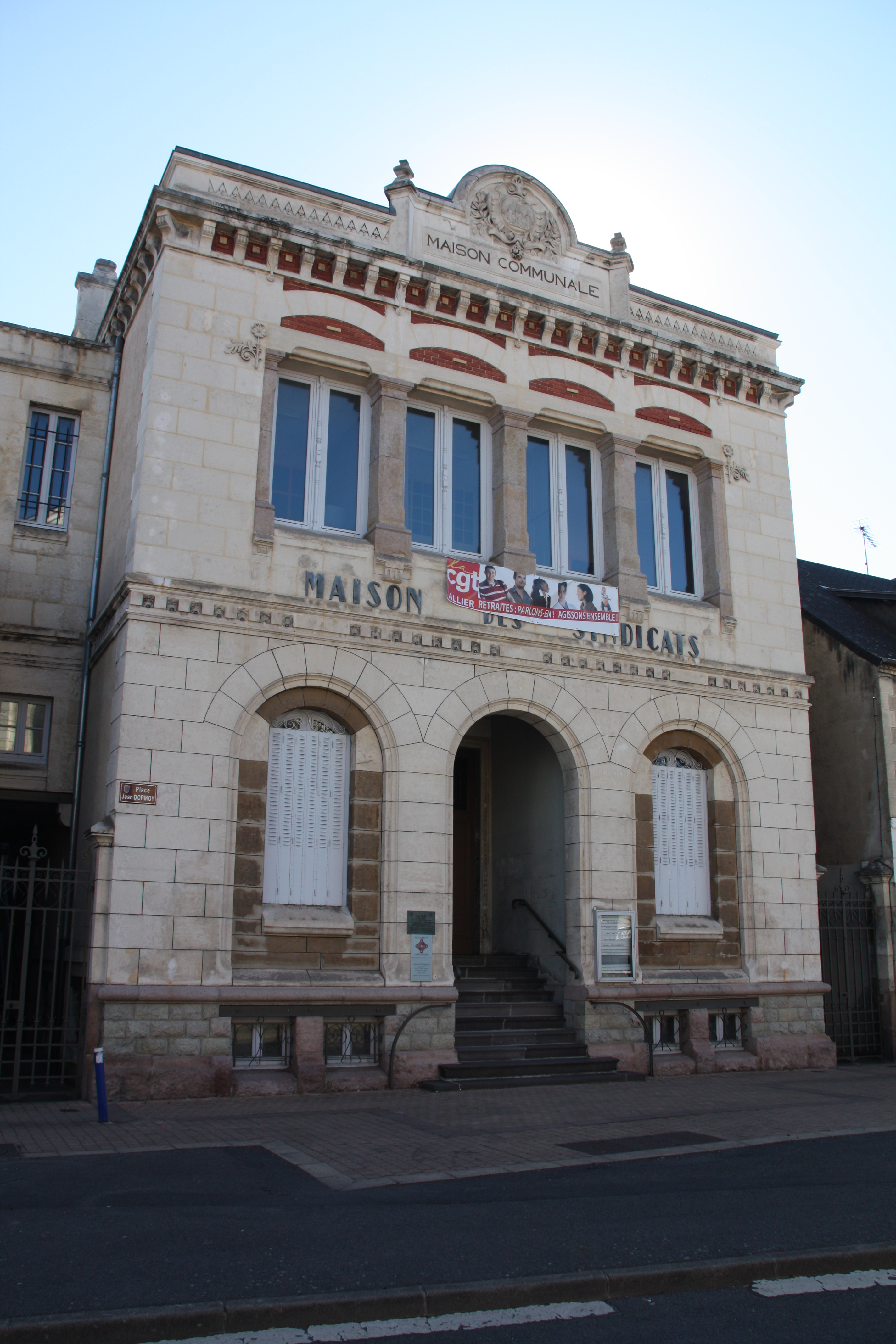 Maison communale de Montluçon France